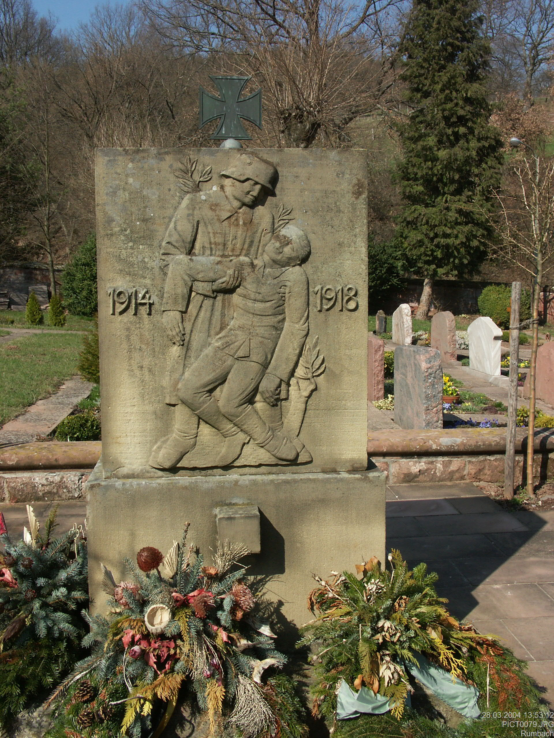 War Memorial - Krieger-/Kriegsopferdenkmal - Mémorial de guerre